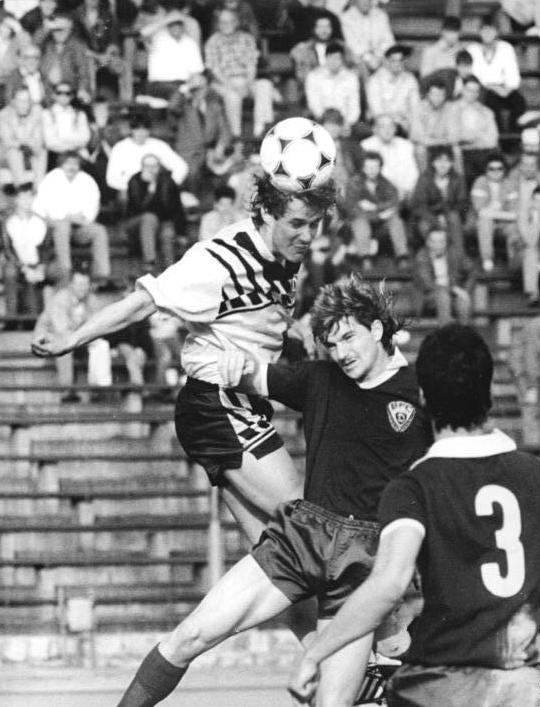 ADN-ZB-Oberst-3.8.89-sche- Berlin: Vorbereitung Supercup-Spiel- DDR-Meister SG Dynamo Dresden und Pokalsieger BFC Dynamo bestreiten am 5.8. in Cottbus erstmalig ein Spiel um den neugeschaffenen "Pokal des Deutschen Sportechos". Der Dresdner Torsten Gütschow (oben), Torschützenkönig der vergangenen Saison, in einem früheren Spiel im Zweikampf mit dem Berliner Thomas Strecker, hofft aich in diesem Supercup-Spiel seinen "Torriecher" unter Beweis stellen zu können."